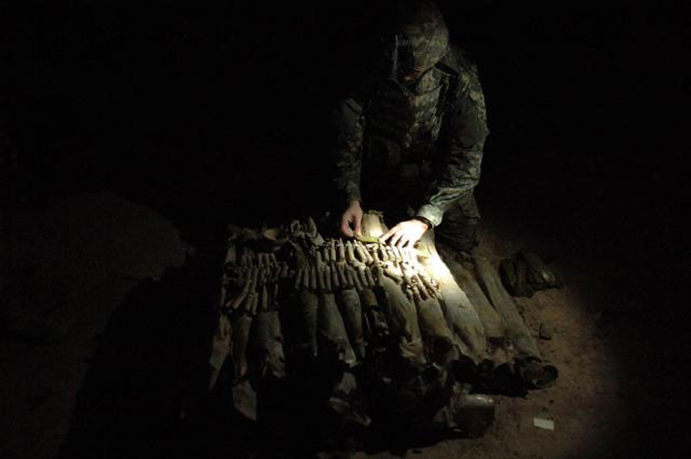 Waffenfund durch US-Soldaten während der Operation Imposing Law, am 31. März 2007.